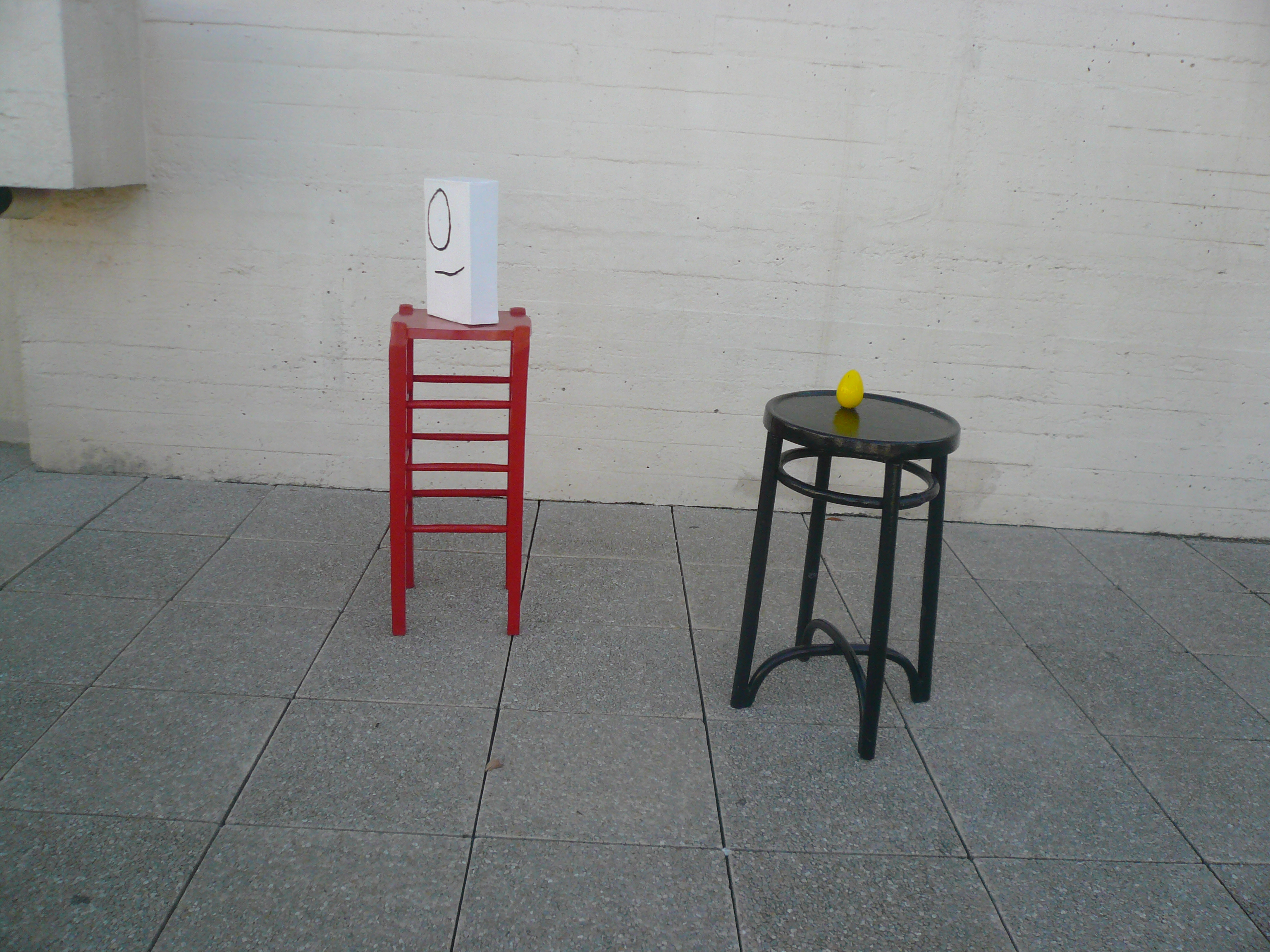 Fundació Miró (Barcelona) Object location41° 22′ 07″ N, 2° 09′ 36″ E